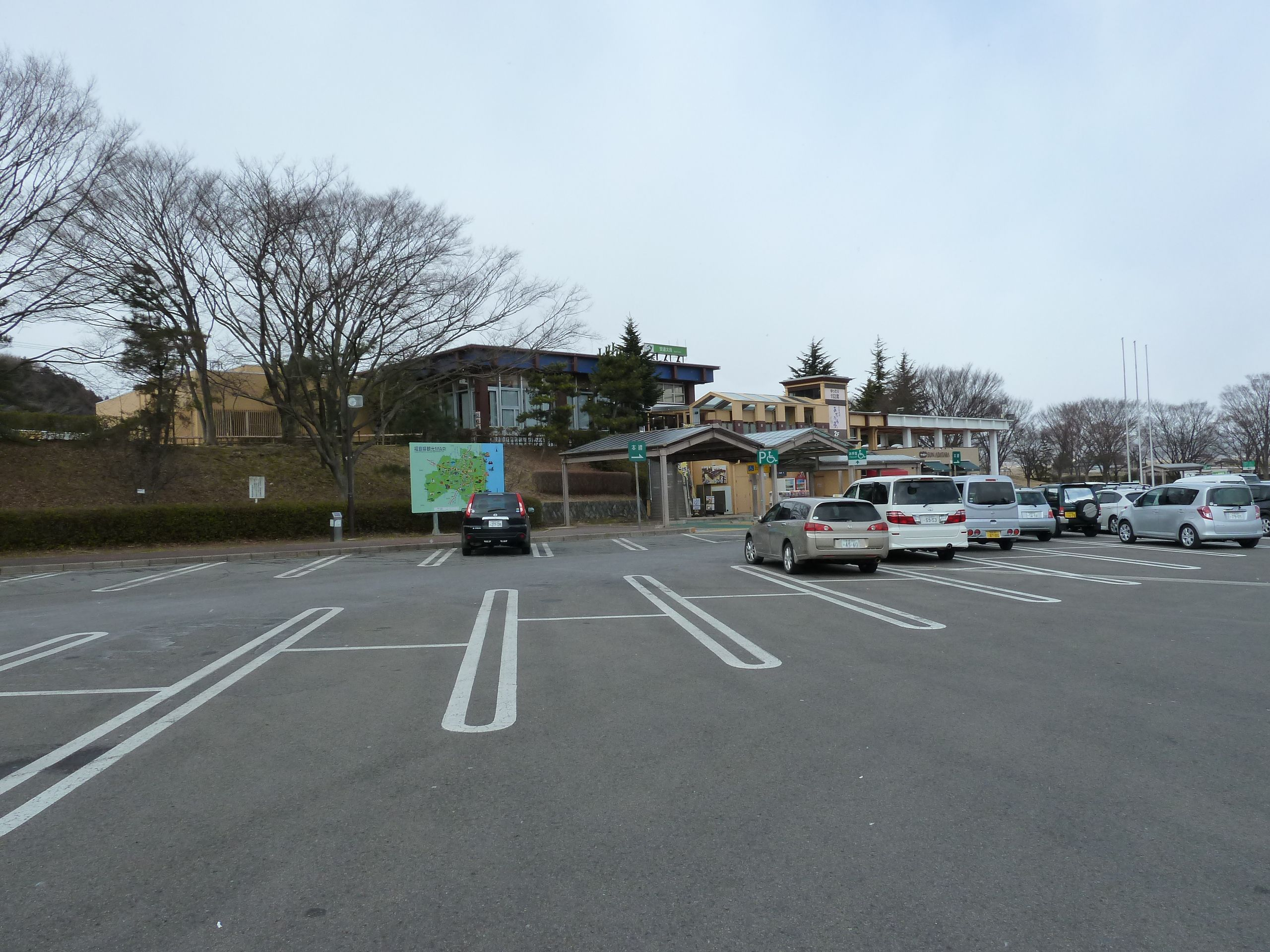 東北自動車道 安達太良サービスエリア（下り線）